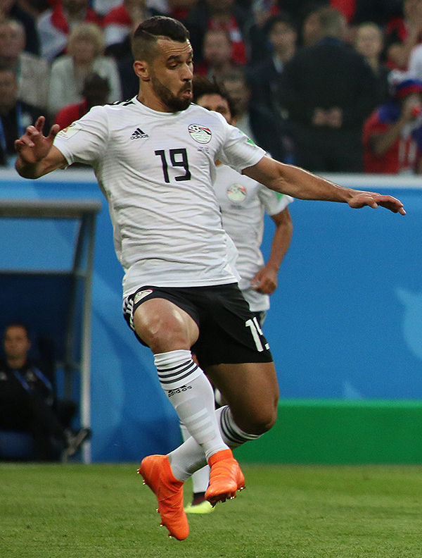 Историческая победа сборной России в матче с Египтом!